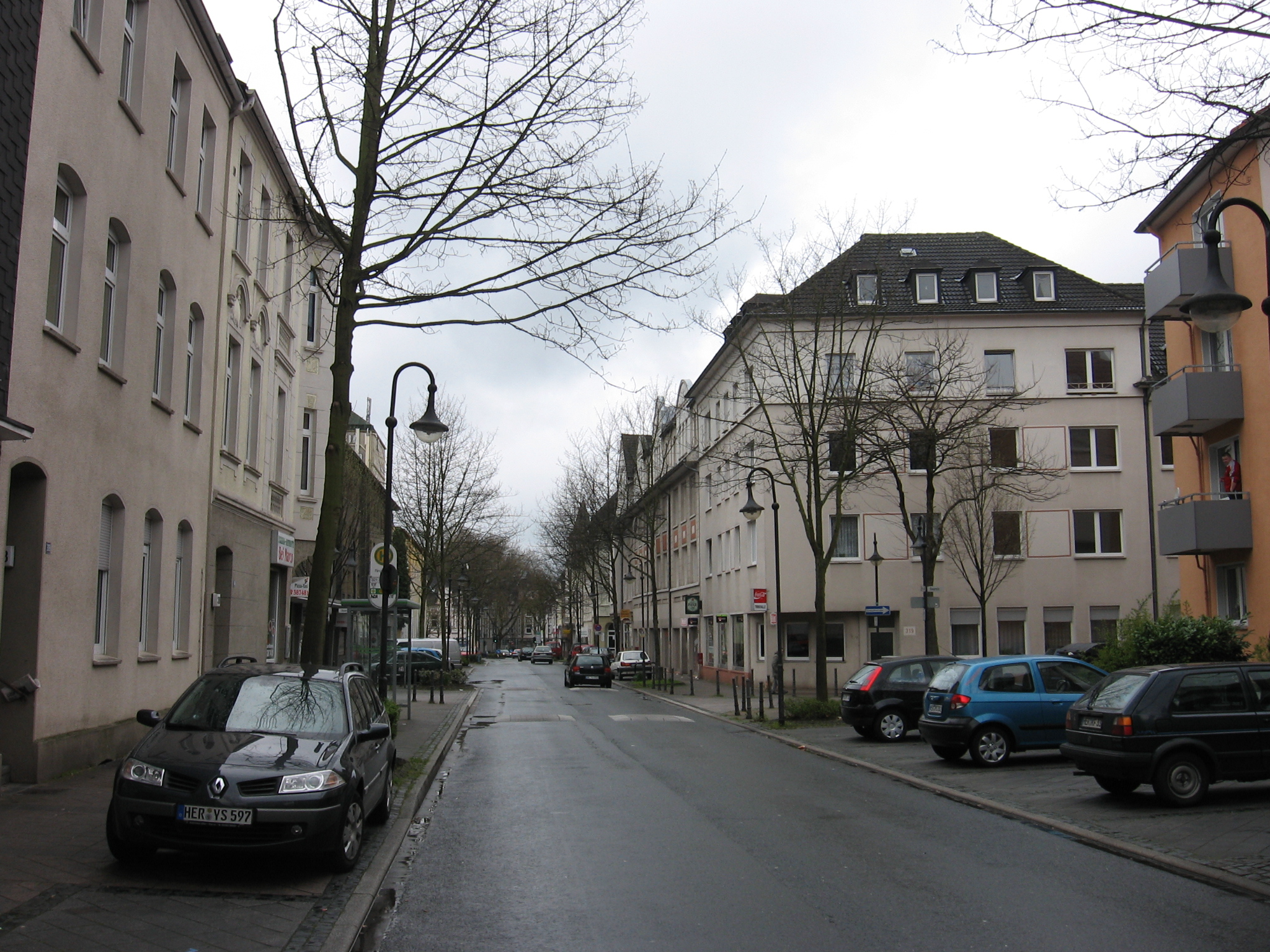 Sodingen, Herne. Mont-Cenis-Str. Höhe Haus Nr. 306